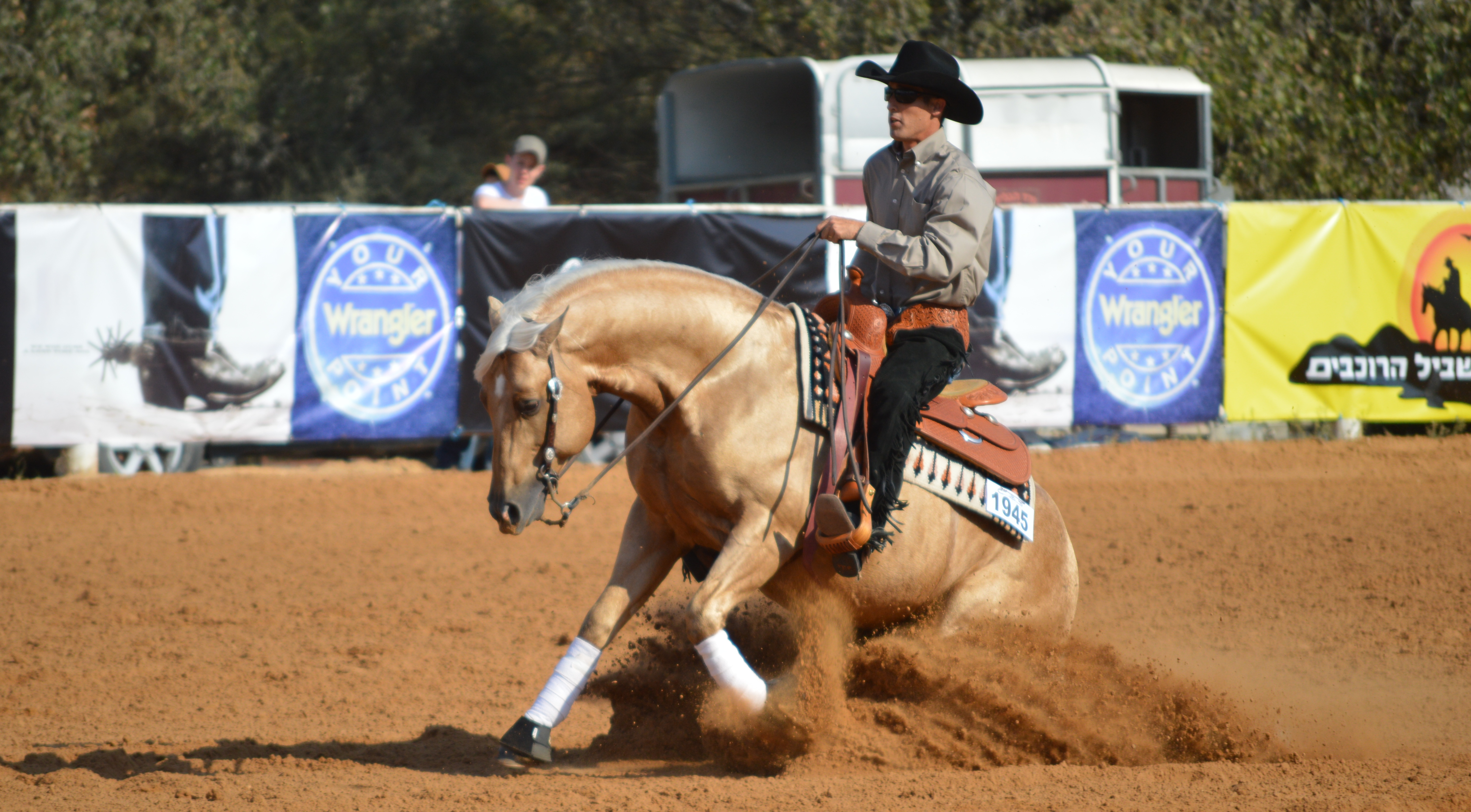 עצירת החלקה (Sliding Stop), מבוצעת בידי הרוכב הישראלי קאיה אחישר